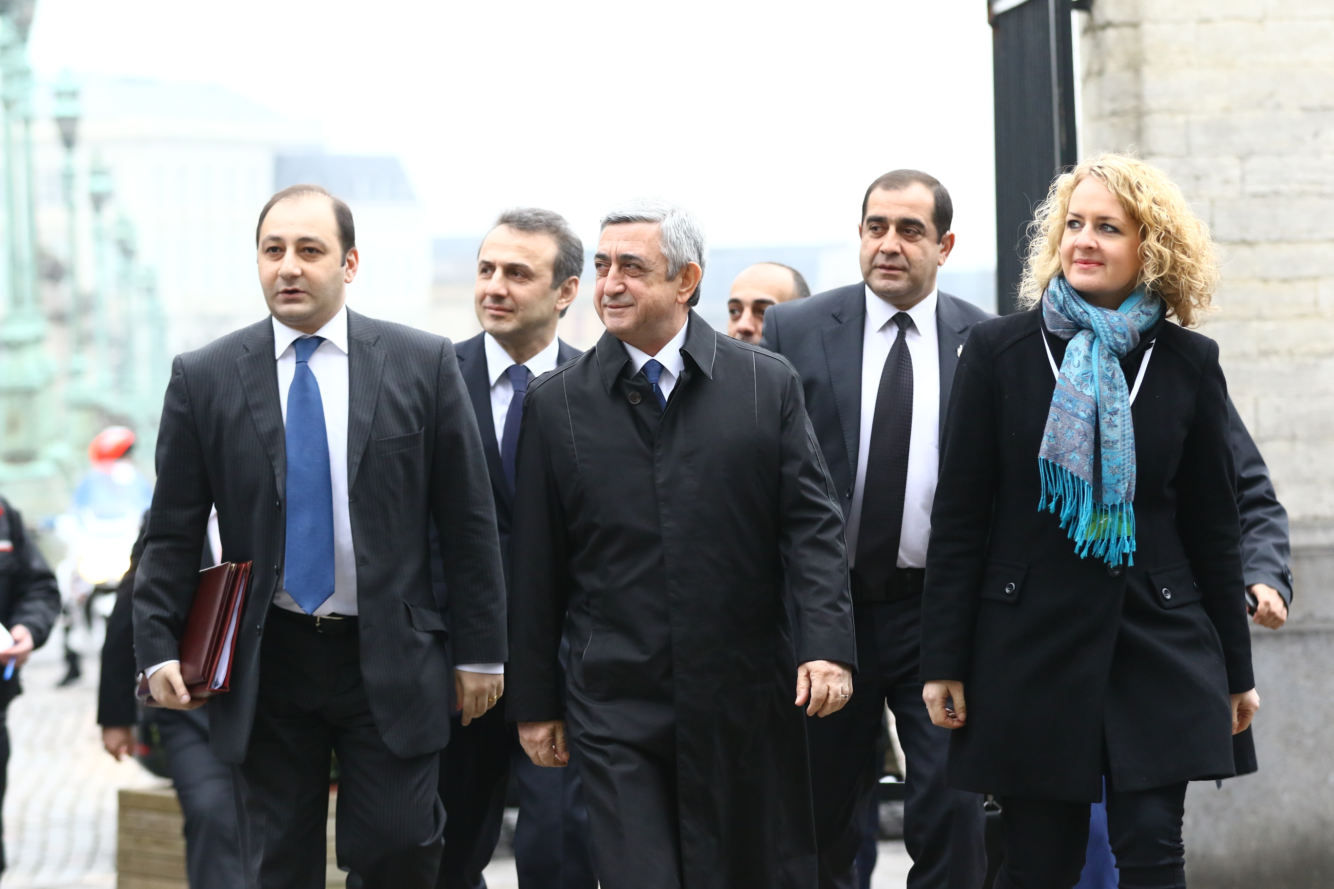 EPP Summit, March 2015, Brussels